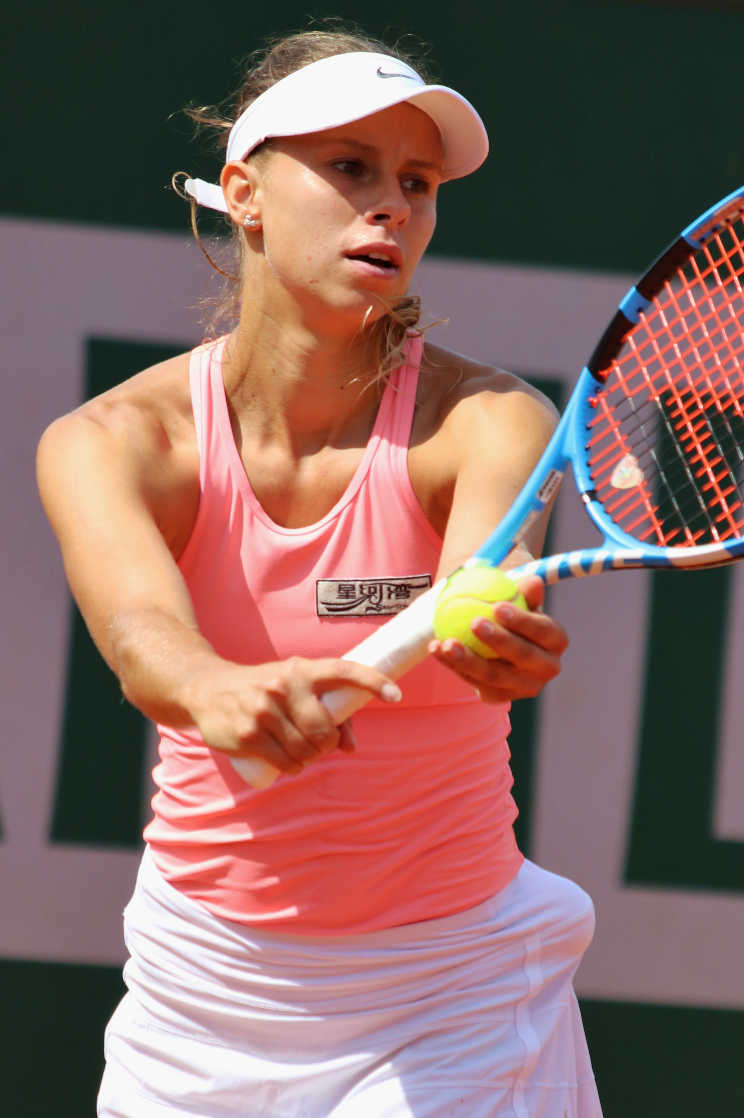 Linette RG18 (17)